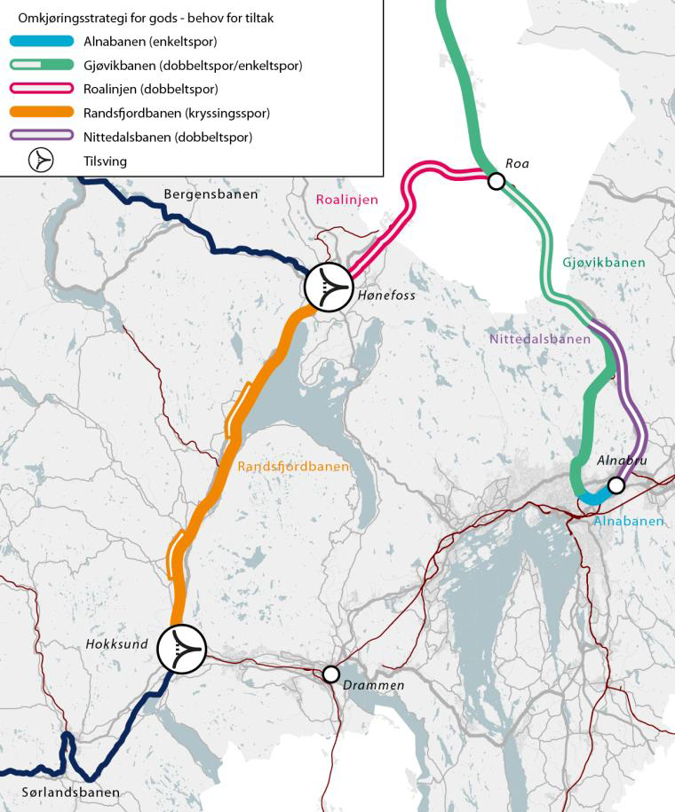 Utviklingsmuligheter for nedre del av Gjøviksbanen / Nittedalsbanen og Roalinjen, fra KVU Oslonavet